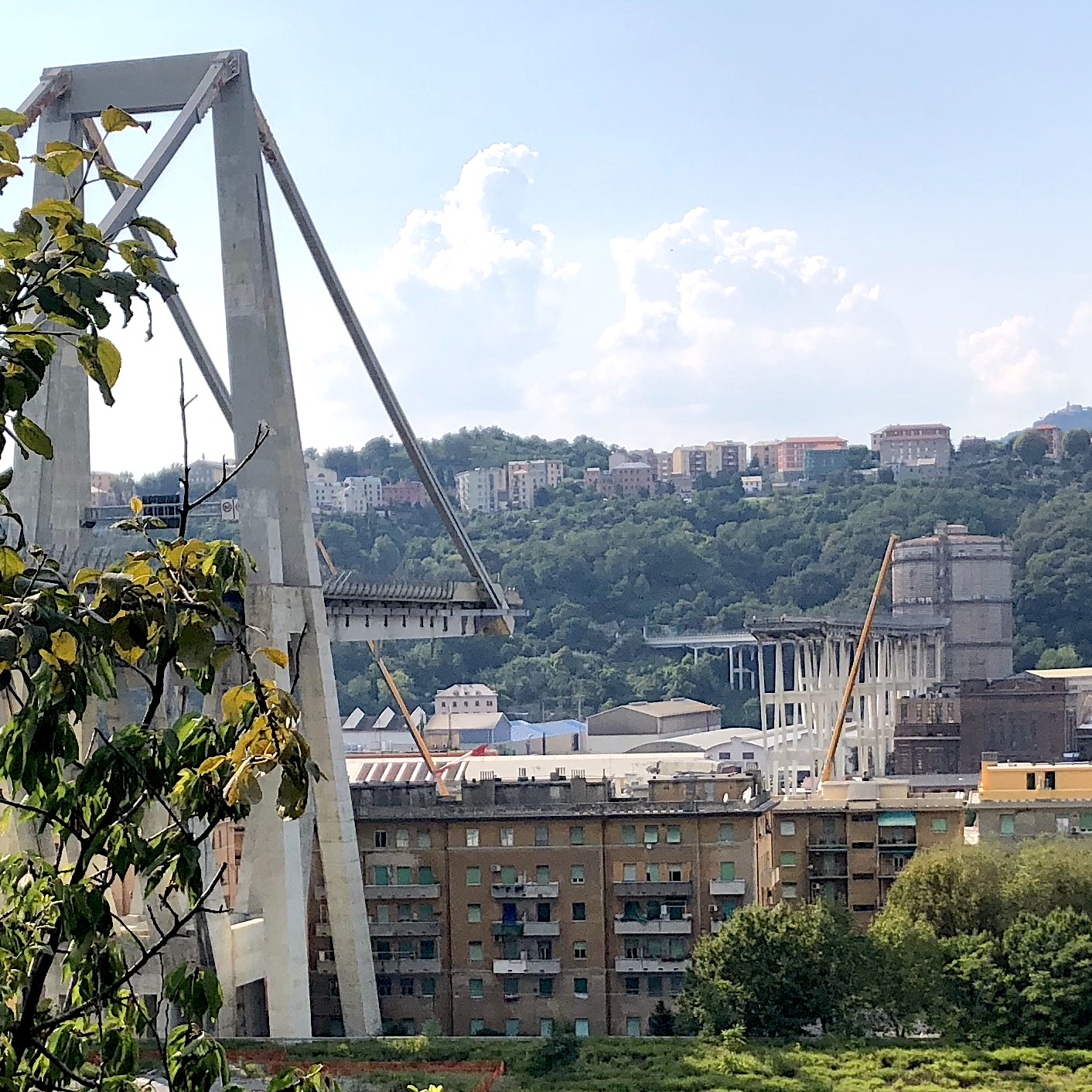 Immagine del Ponte Morandi, dopo il crollo avvenuto il 14 agosto Visuale da Est presso lo svincolo di Genova Ovest